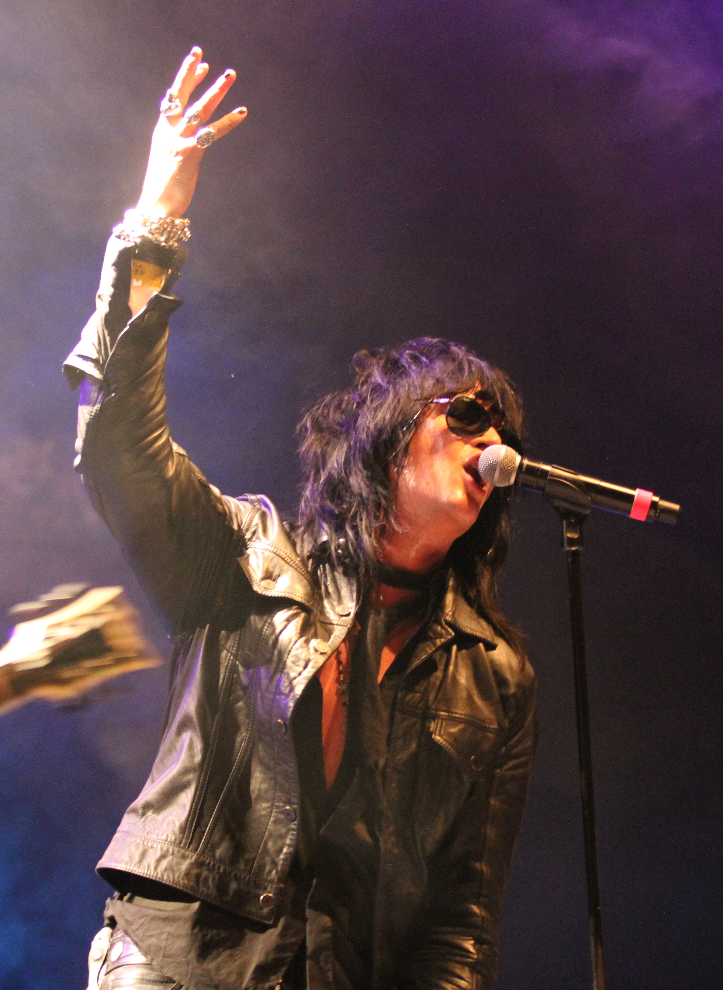 The 69 Eyes auf dem Wave-Gotik-Treffen 2013 in der Agra-Halle.